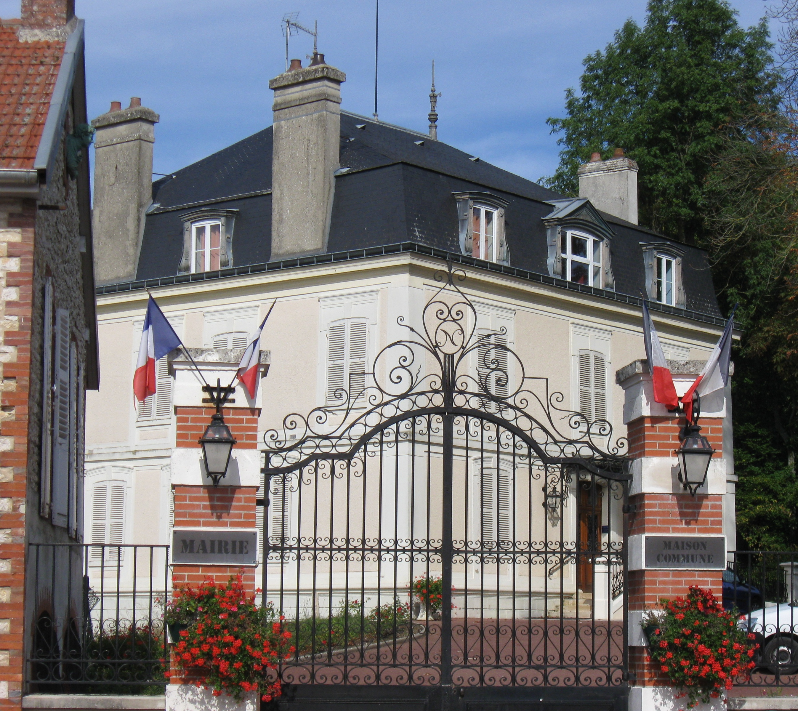 Mairie de Poigny (département de la Seine et Marne, région Île-de-France).